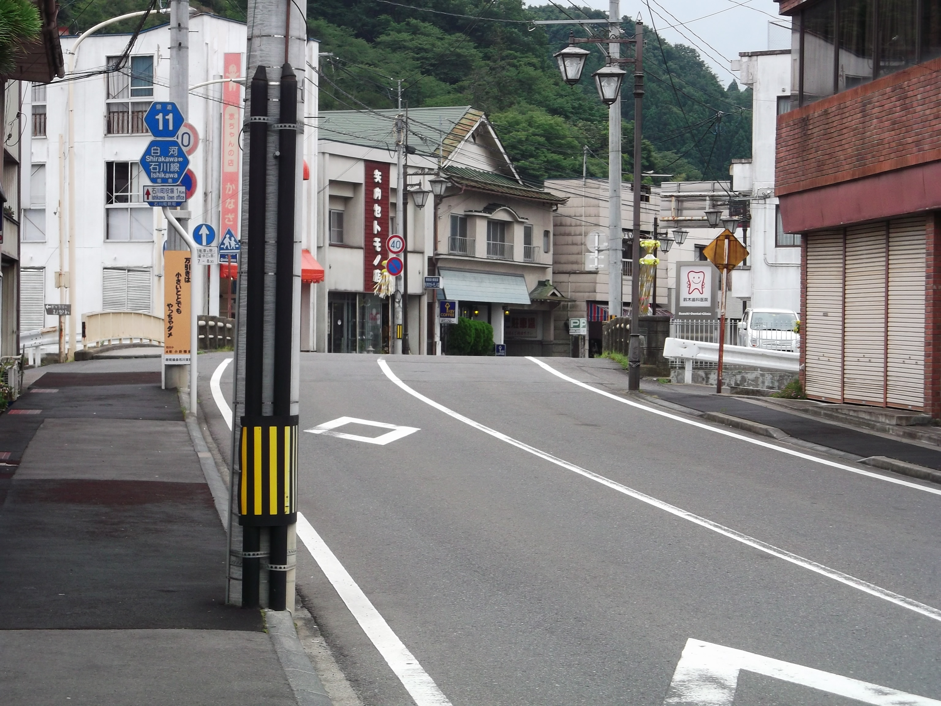 福島県道11号白河石川線（福島県石川町）